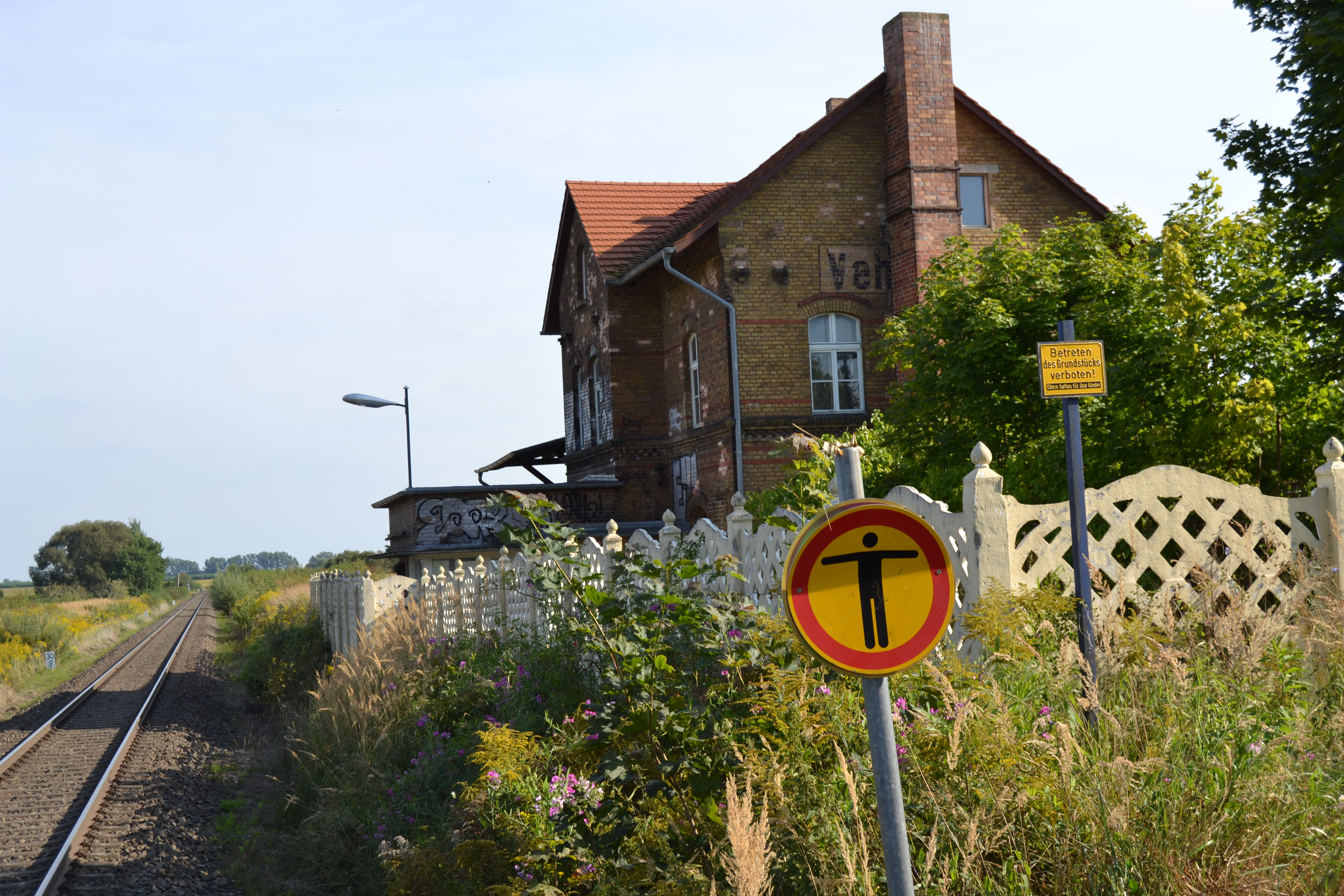 Bahnhof Vehlefanz, bestehend aus Empfangsgebäude, Güterschuppen und Stellwerkshäuschen